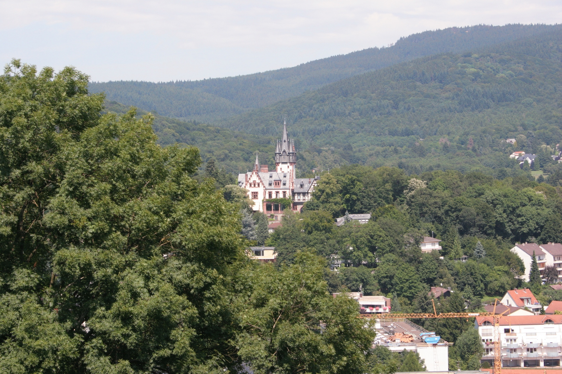 Villa Andreae (ehemaliger Firmensitz von Jürgen Schneider) in Königstein im Taunus